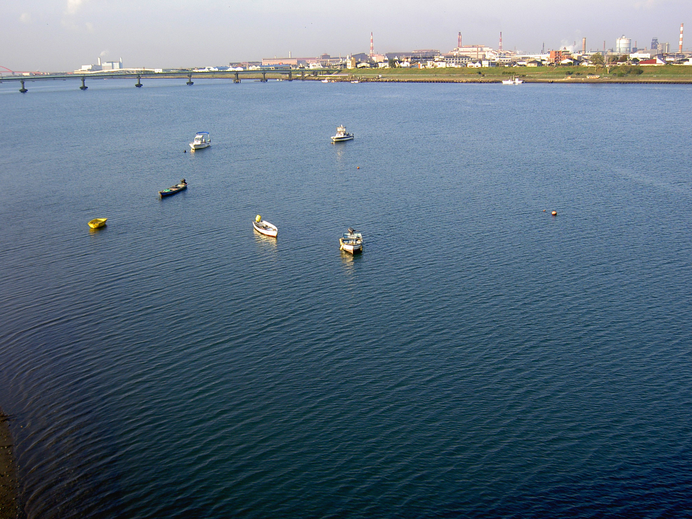 The Kinokawa River in Wakayama, Wakayama